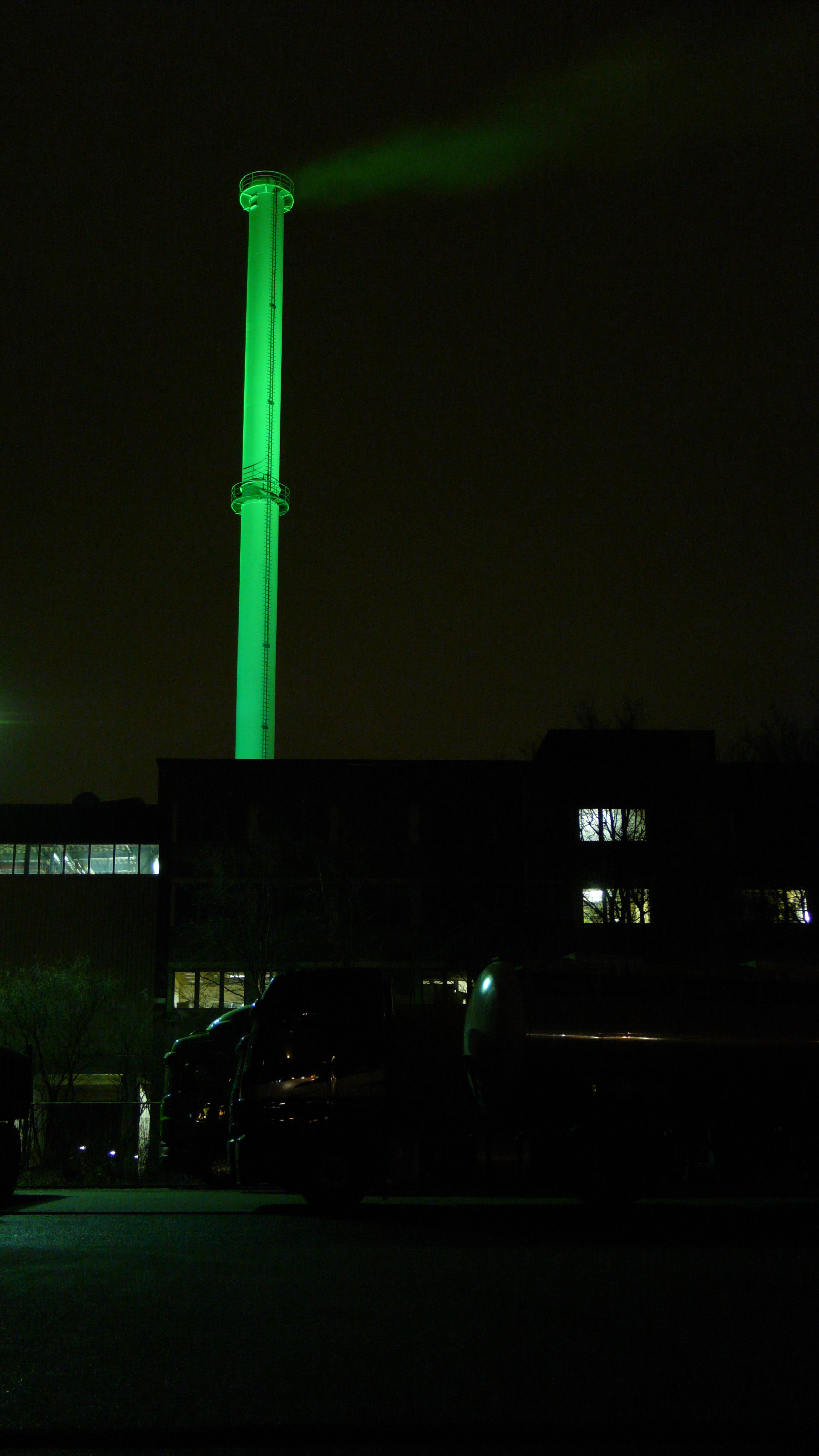 Heizkraftwerk Düsseldorf-Garath bei Nacht, Stadtwerke Düsseldorf